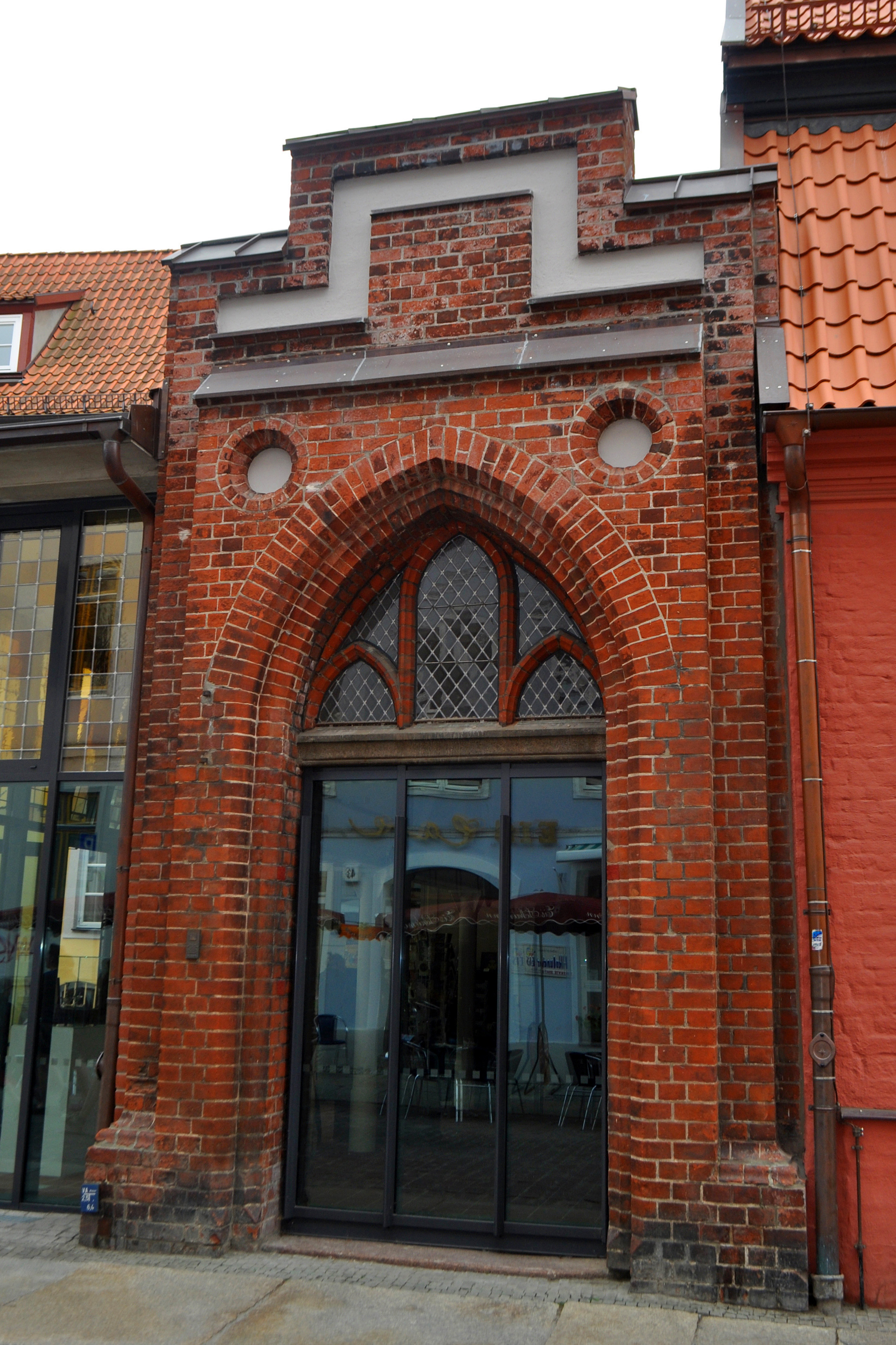 Eingang zum Kulturhistorischen Museum in Stralsund, im ehemaligen Katharinenkloster, das auch als Gymnasium genutzt wurde.